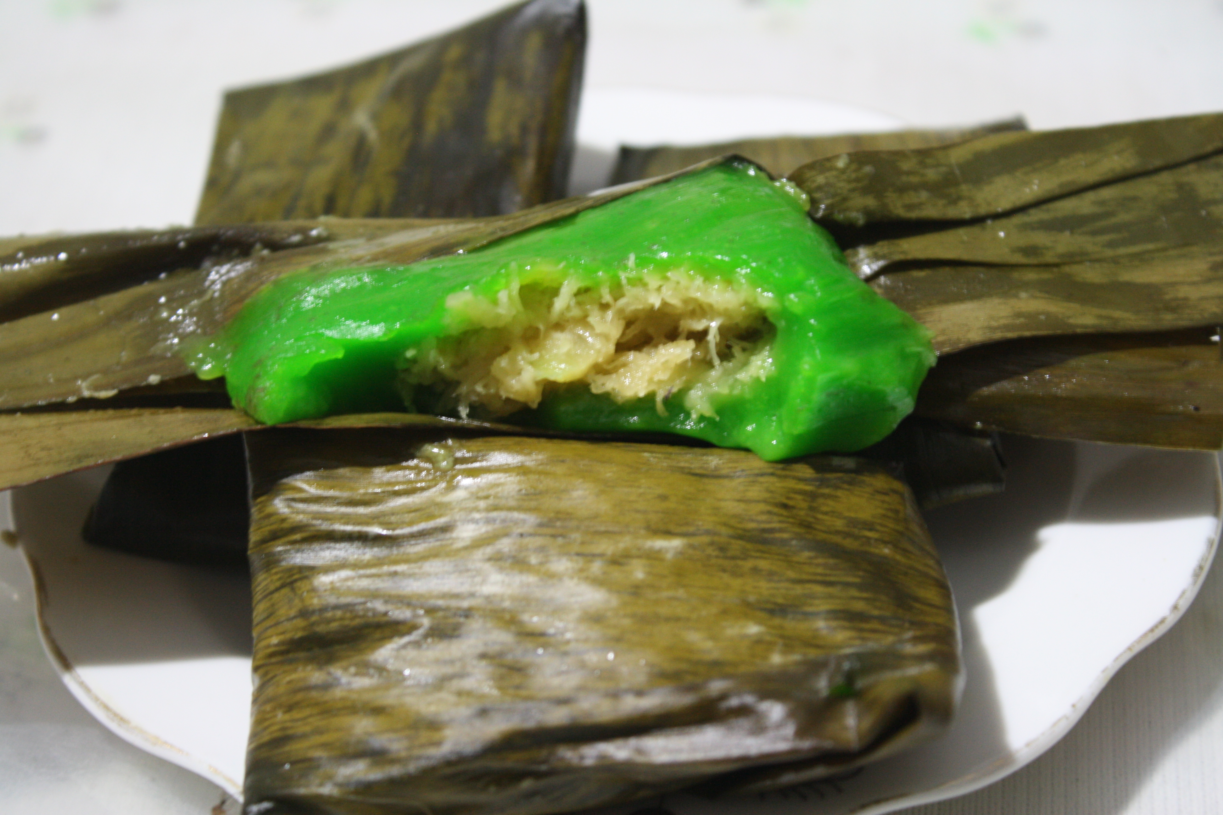 bugis ii kelapas